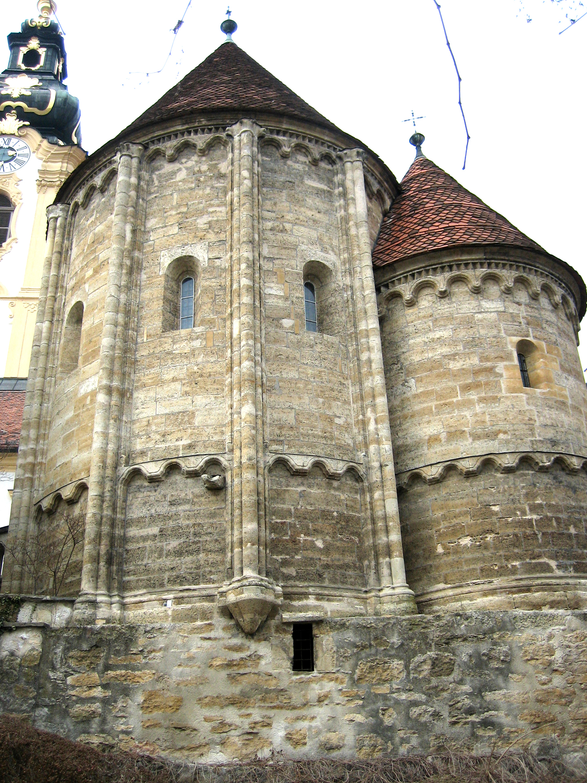 Karner